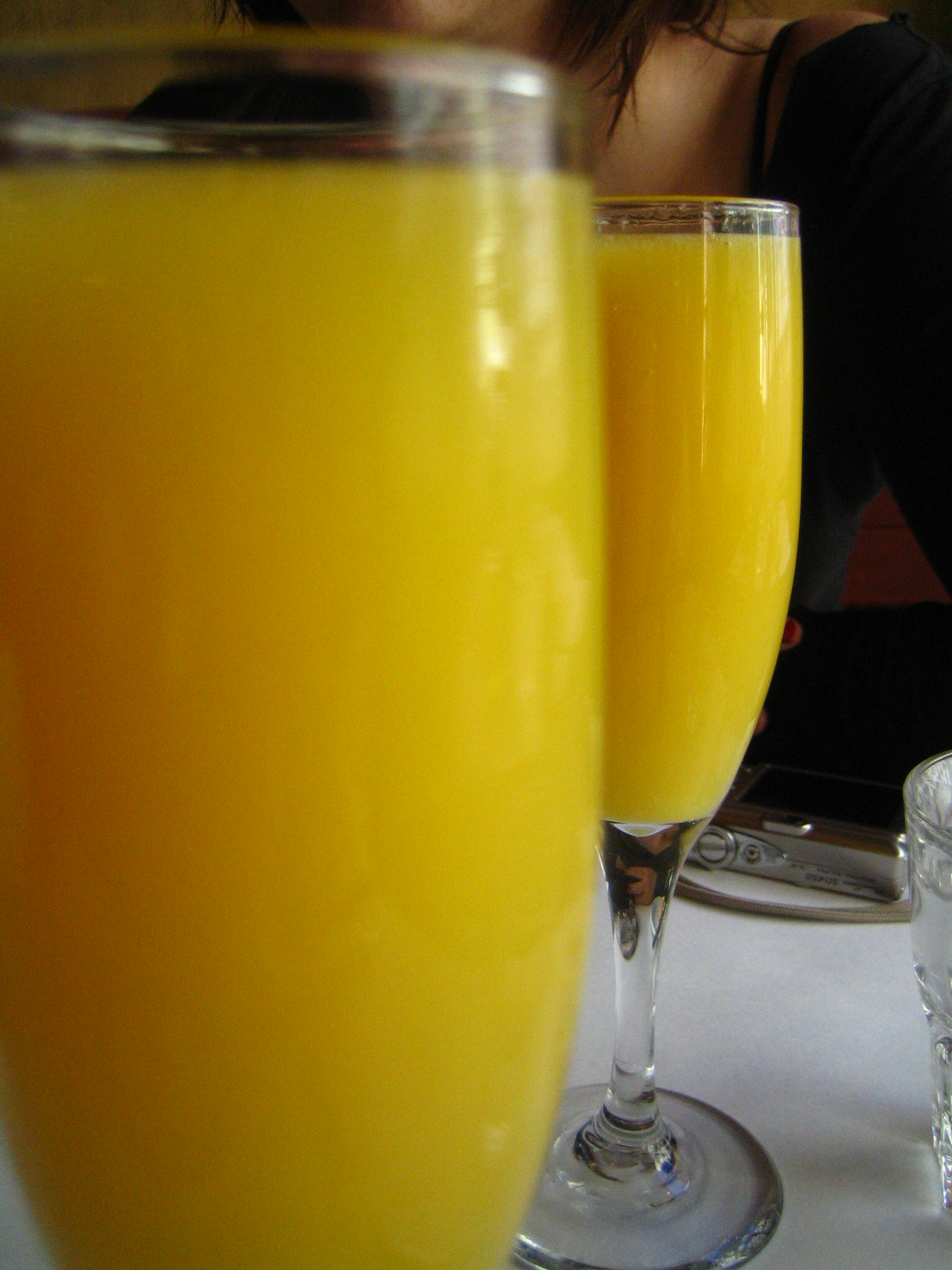 mimosa - champagne and orange juice cocktail